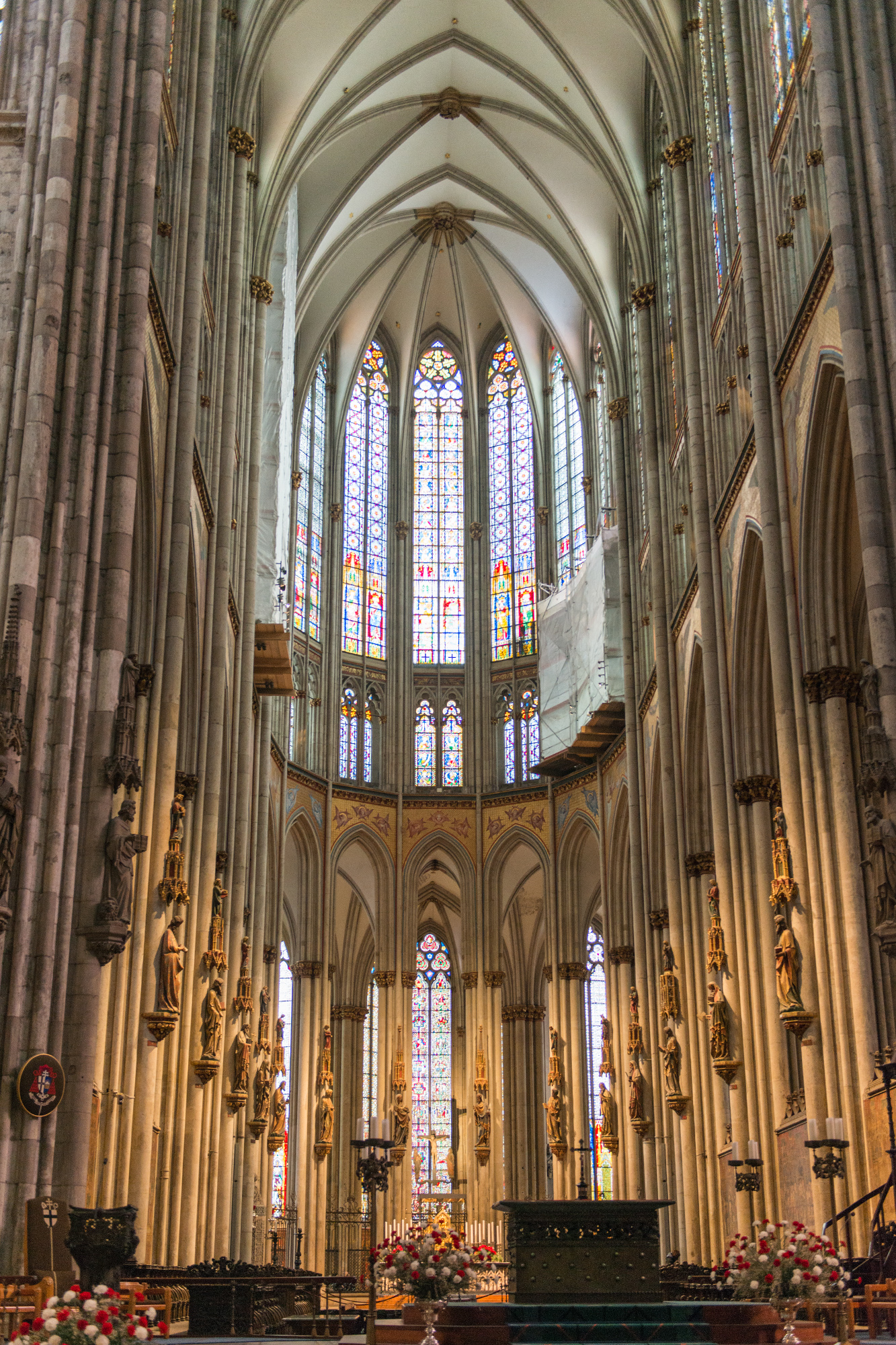 Kölner Dom, Altstadt-Nord, Domkloster 4 This is a photograph of an architectural monument.